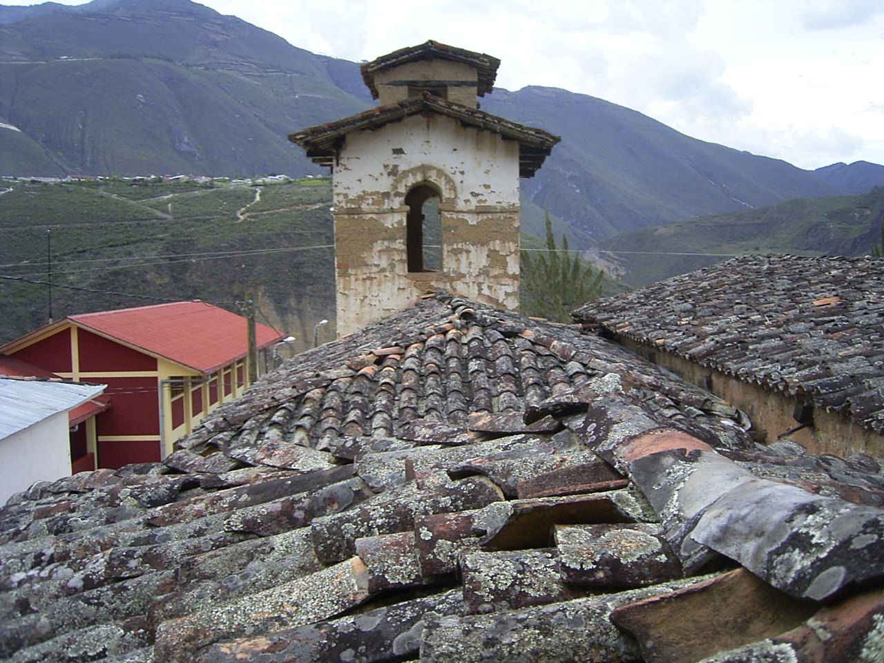 iglesia en Magdalena, Chachapoyas, Amazonas, Peru.